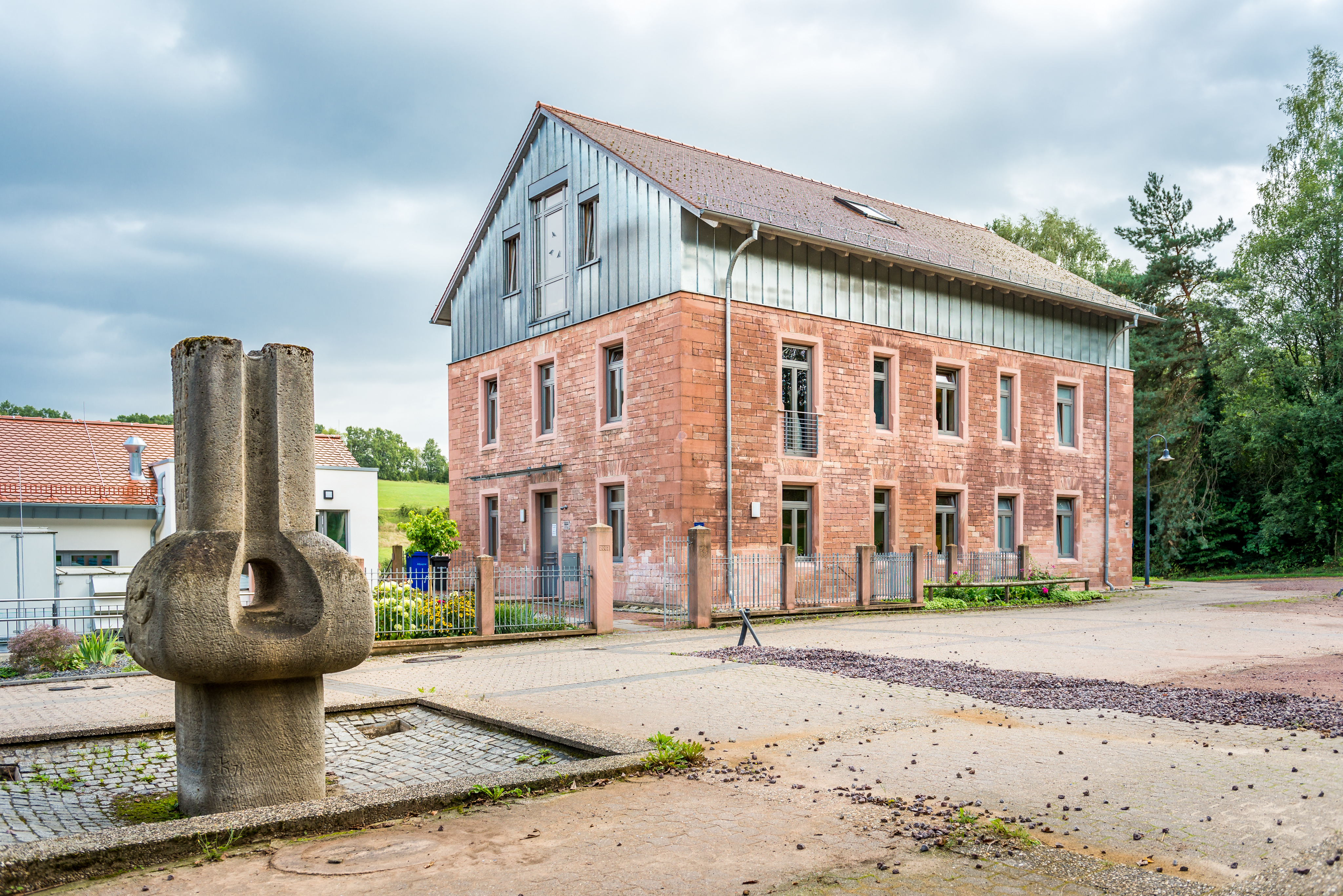 Altes Pfarrhaus am Kirchberg 2, gegenüber der ehemaligen Auferstehungskirche (1971-2009). 1846 erbaut, 1977 mit einem Flachdach versehen und verändert. 2006 von der politischen Gemeinde übernommen und Im Oktober 2007 nach Generalsanierung neu eingeweiht. Heute Haus für Vereine und kulturelle Veranstaltungen (Kultur im Gewölbekeller, katholisches Pfarrbüro, katholische öffentliche Bücherei, Krabbelstube, mehrere Vereinszimmer für Geschichts-, Gesangs-, und Schachverein).This is a photograph of an architectural monument.